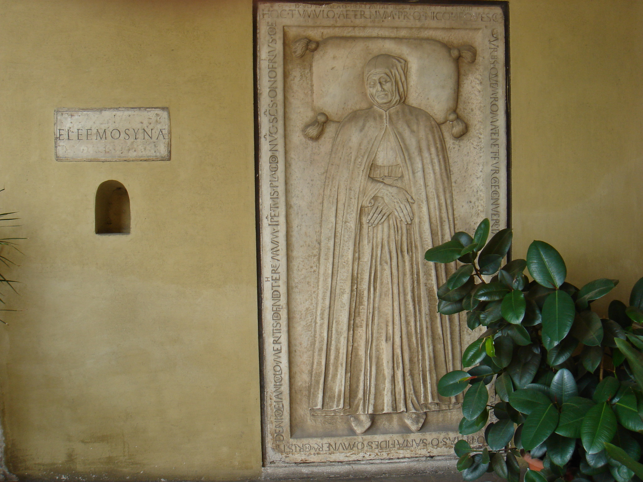 Roma, S. Onofrio al Gianicolo. Lastra tombale di Nicola da Forca Palena (1349-1449) nel portico esterno.